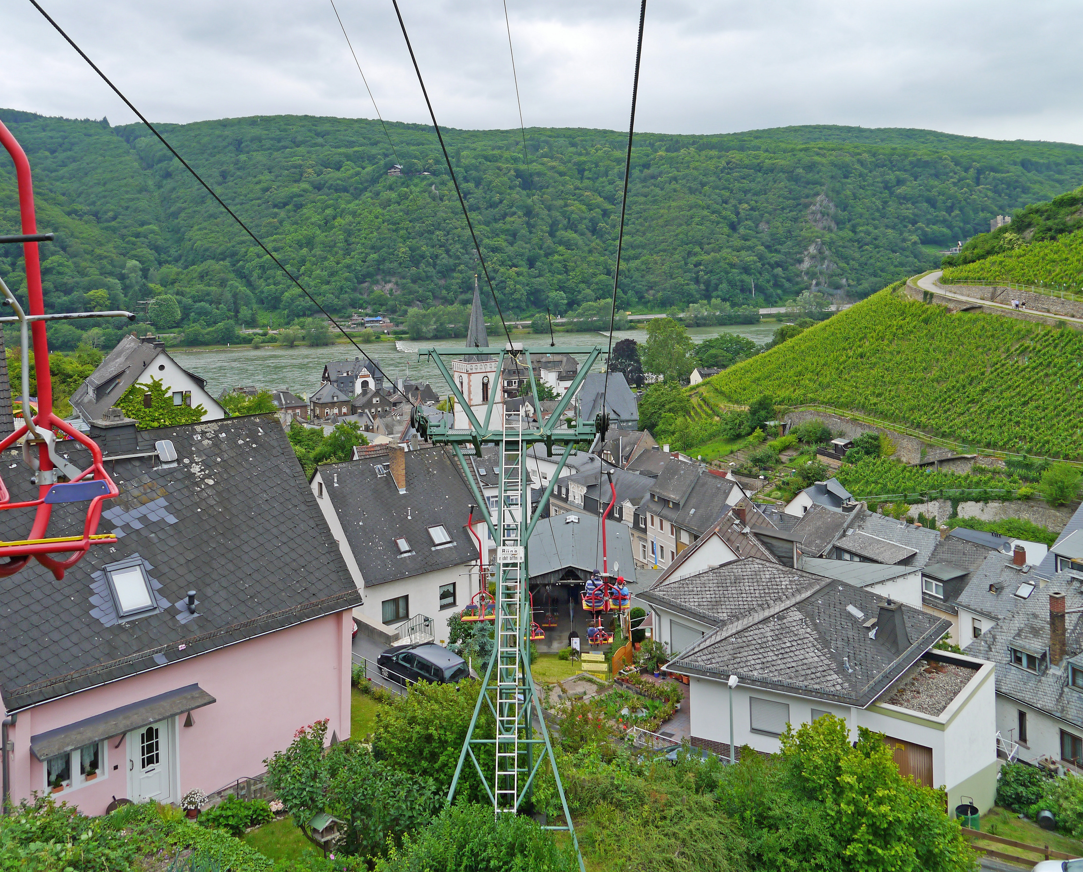 Assmannshausen am Rhein (2012). Vom Sessellift aus.